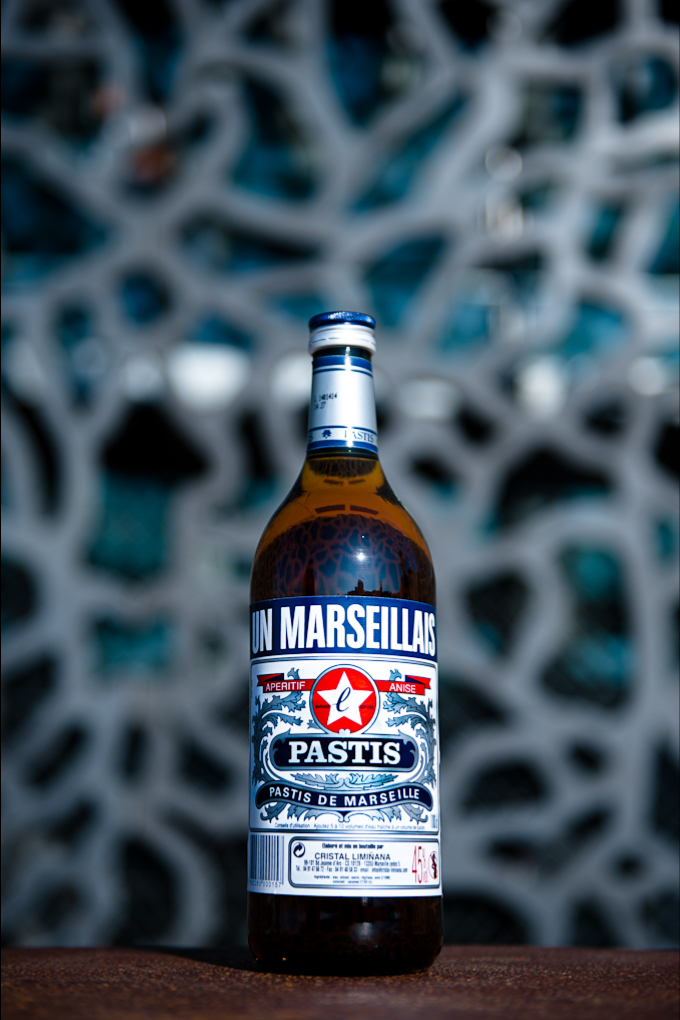 Pastis de Marseille Un Marseillais fabriqué par la société Cristal Limiñana à Marseille